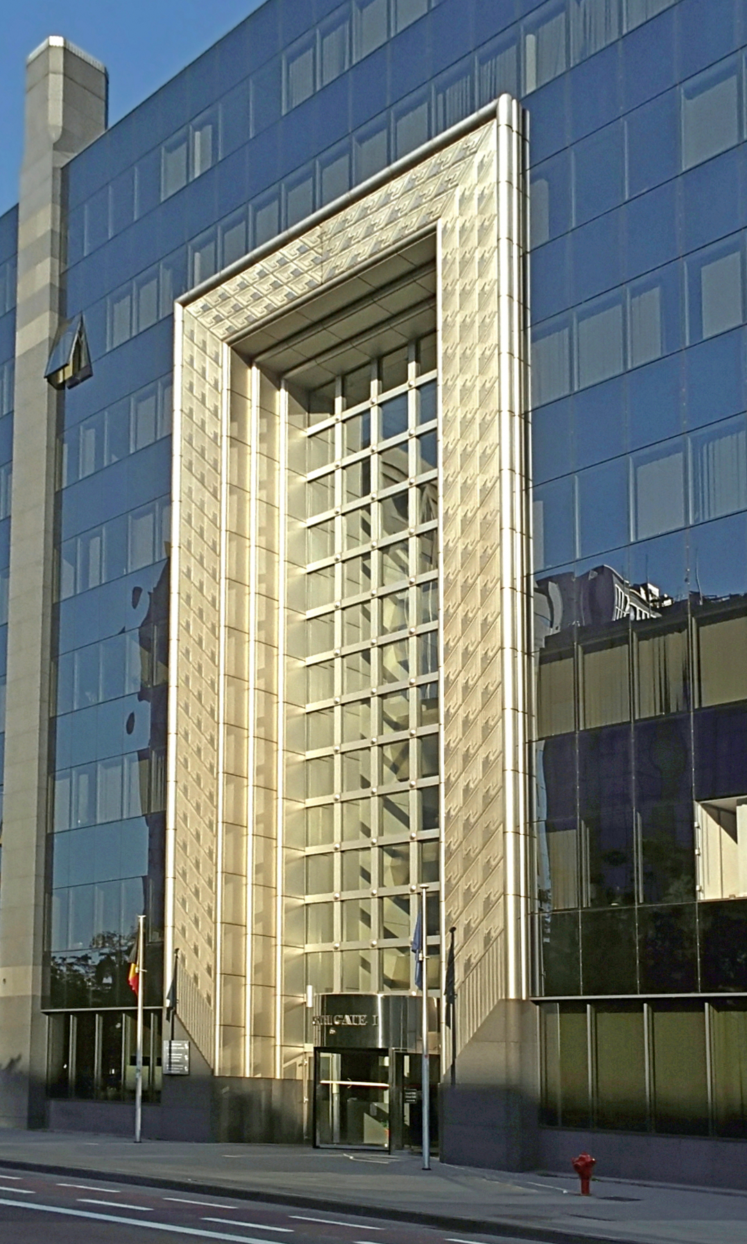 Belgique - Bruxelles - Boulevard Roi Albert II - North Gate I (Architecture postmoderne en Belgique - Atelier d'architecture de Genval - 1995)